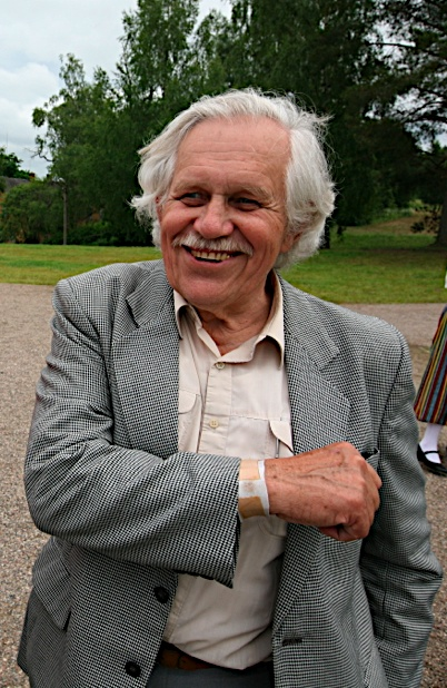 Hans Sissas Eesti Ema monumendi avamisel